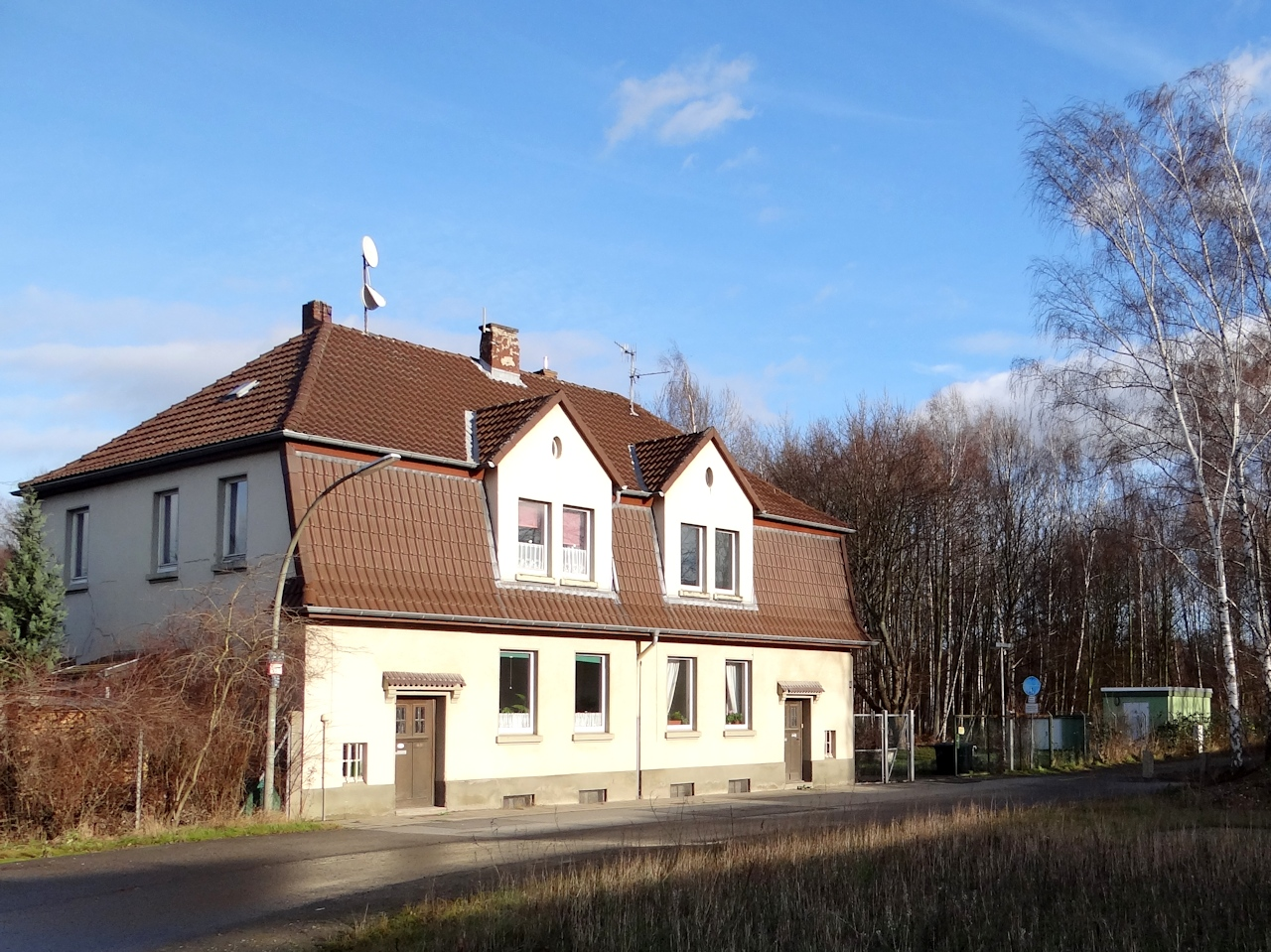 Wohngebäude auf dem Gelände des ehemaligen Wasserwerks Rüningen am Schrotweg. Die anderen Gebäude sind mittlerweile komplett abgerissen worden. Blickrichtung Nordost.